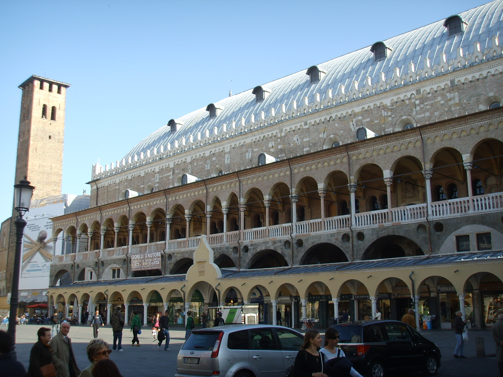 Padova, palazzo della ragione